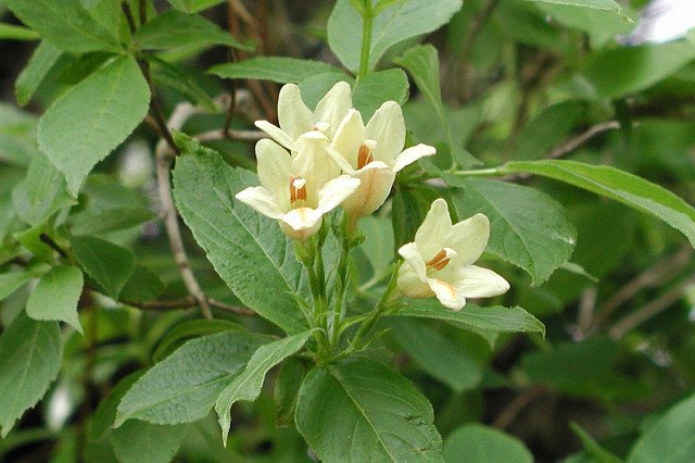 ウコンウツギ （北海道大雪山黒岳）Weigela middendorffiana (Mt. Daisetsu Kurodake, Hokkaido, JAPAN)